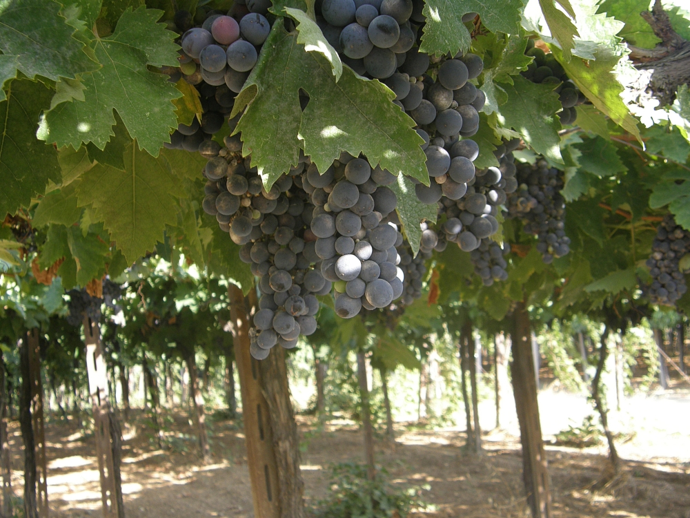 Montepulciano d'Abruzzo Centrale" in Pescara